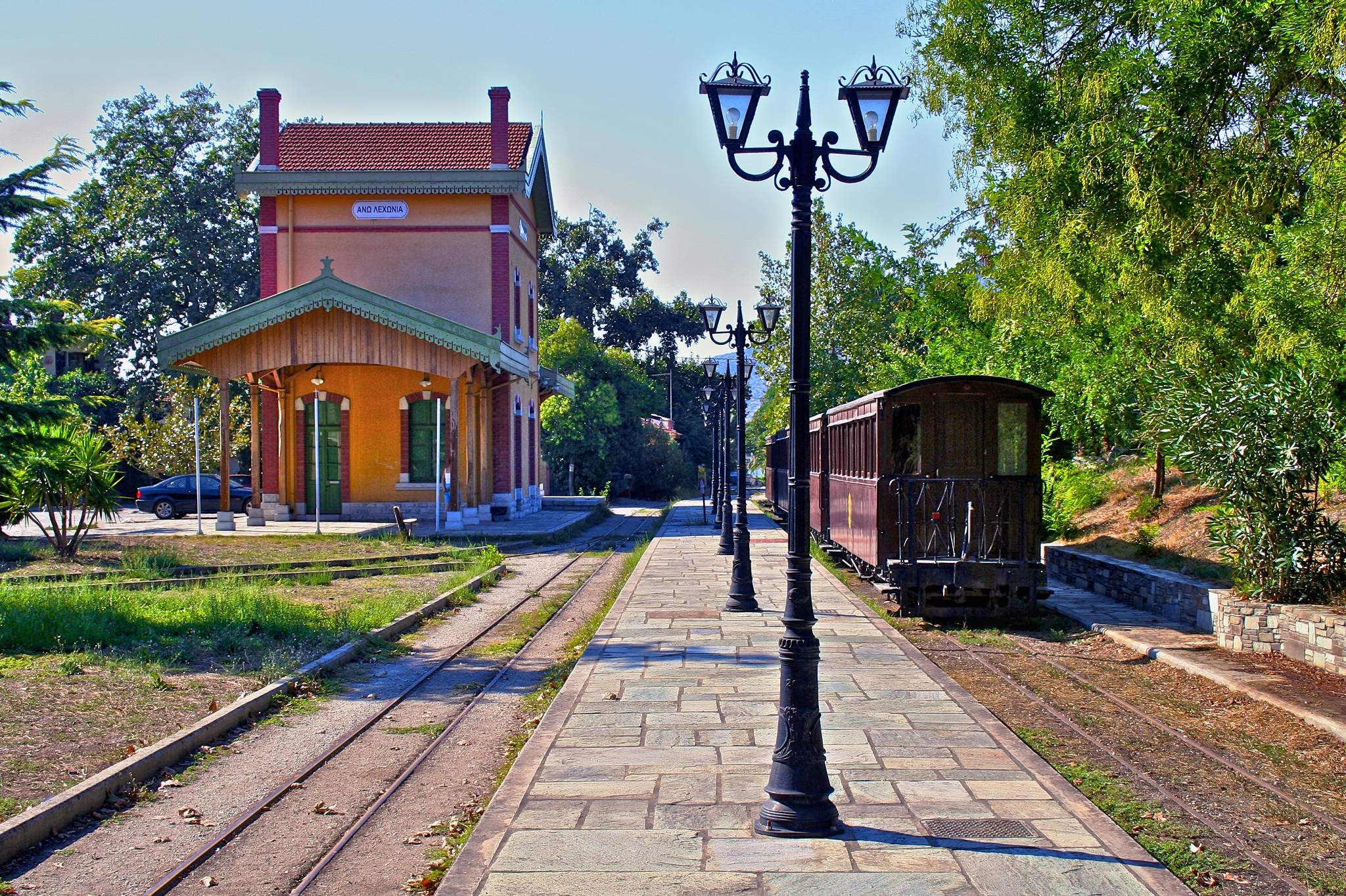 στα Άνω Λεχώνια